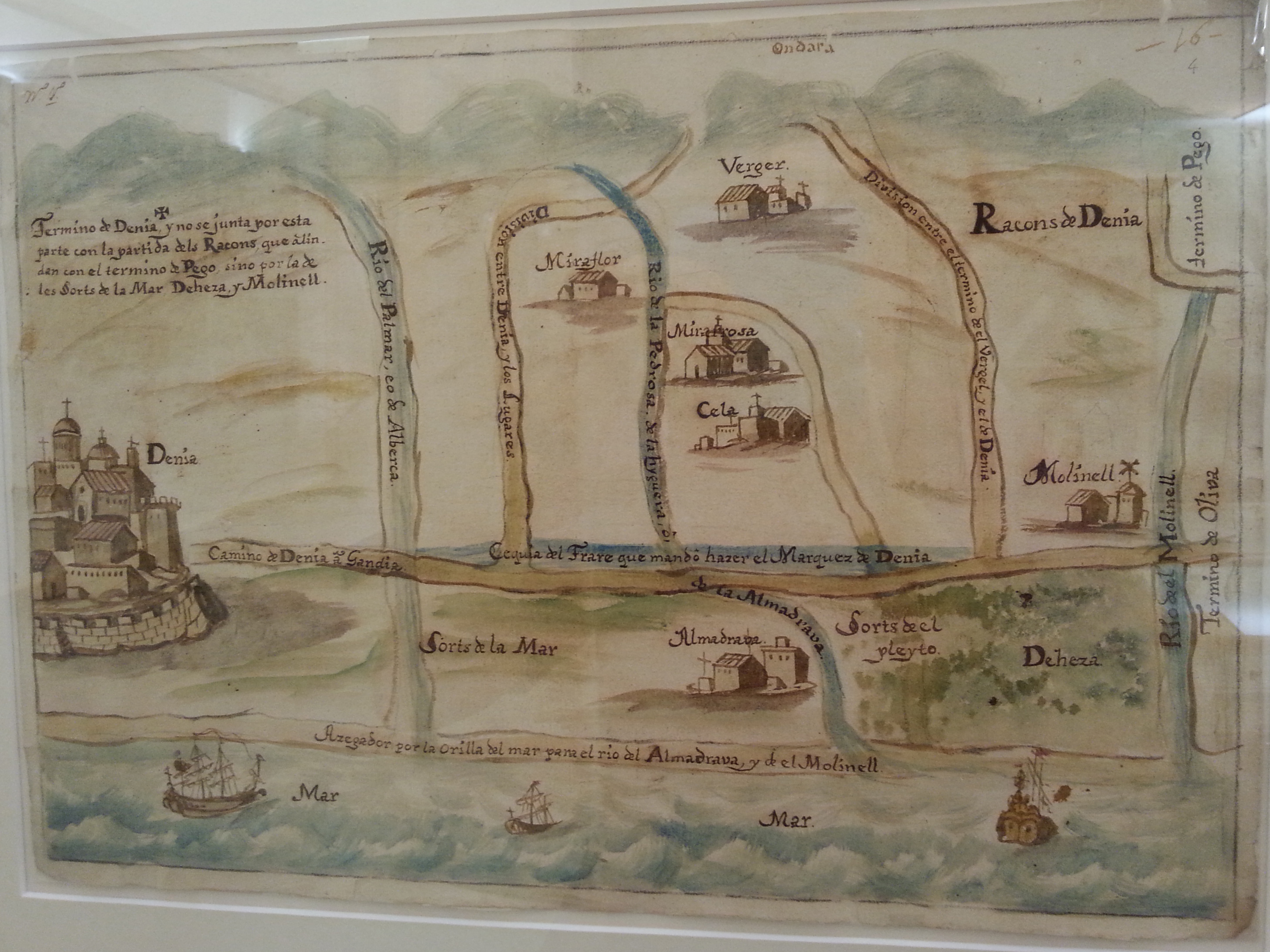 Mapa de les partides de les Sorts de la Mar, la Devesa i el Molinell, en el terme de Dénia. Any 1718. ARV: mapes i plànols, num. 255. Arxiu del Regne de València.